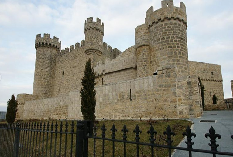 CastilloFlordeLis